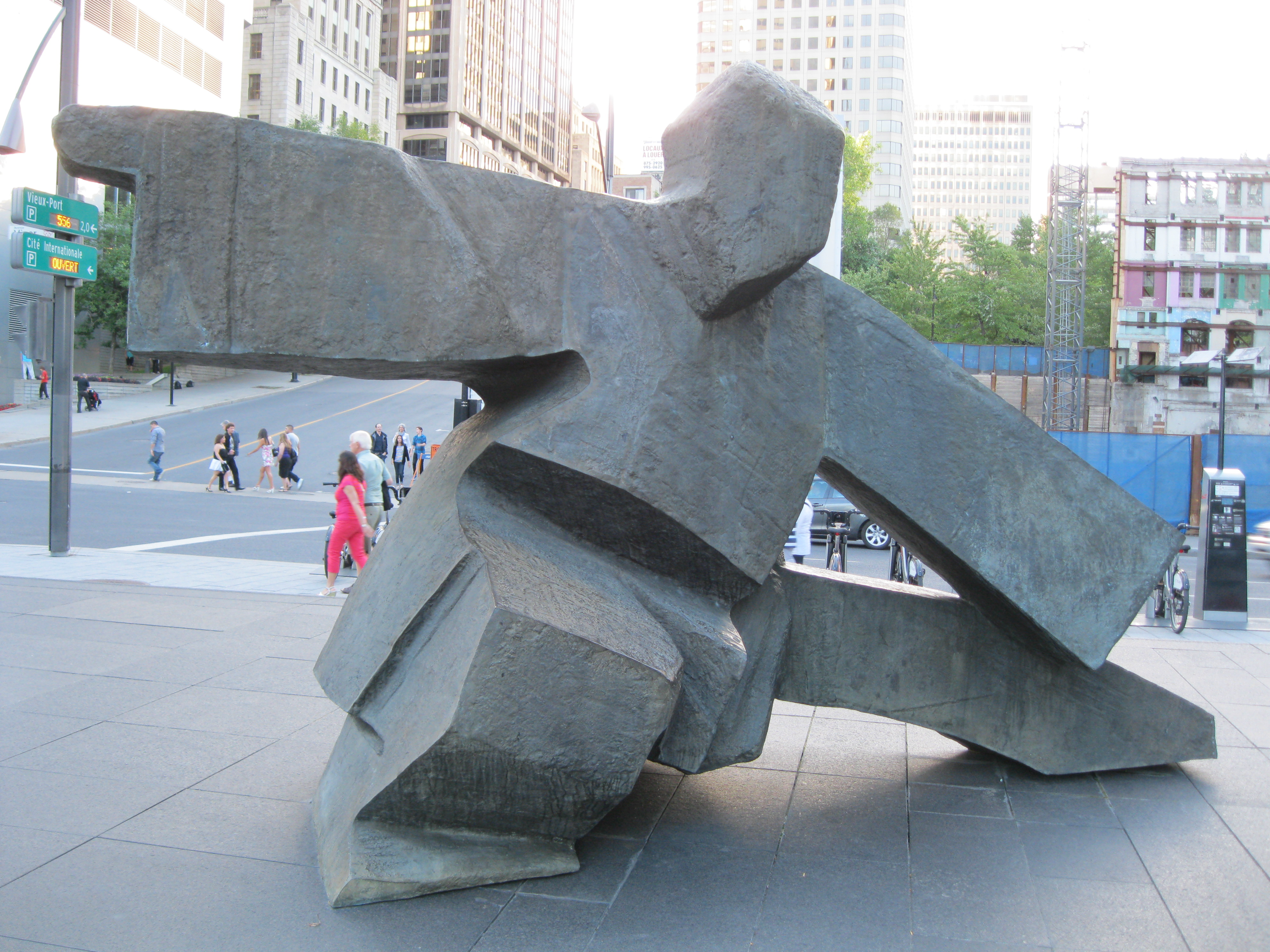 Bronze de Ju Ming intitulé TaiChi Single Whip, square Victoria, Montréal